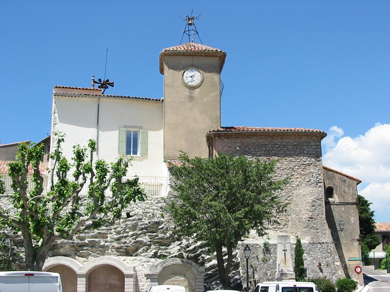 L'église de Mimet, dans les Bouches-du-Rhône.